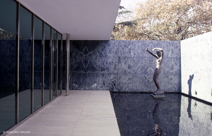 Pavelló alemany (Barcelona)